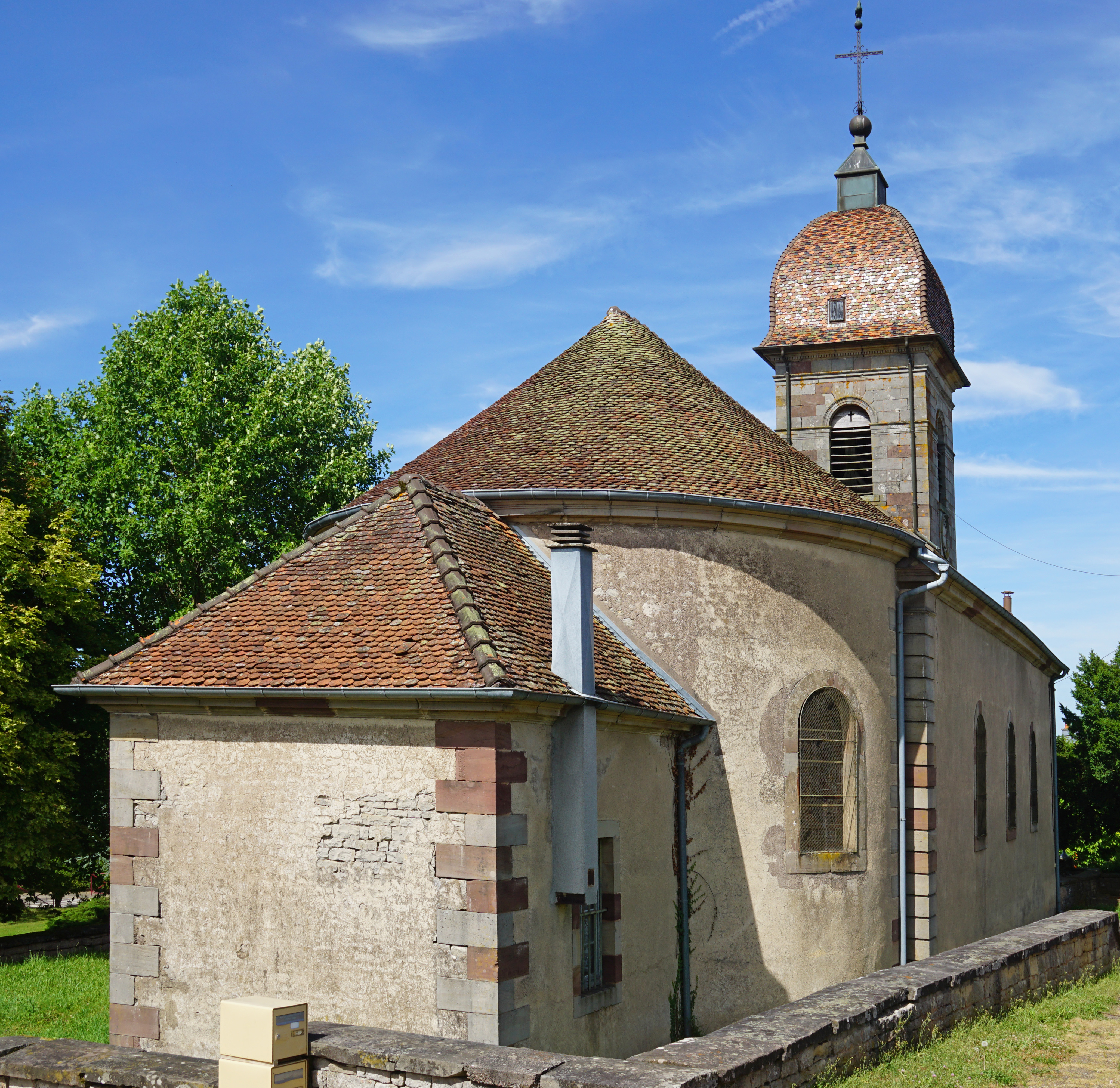 L'église d'Abelcourt.